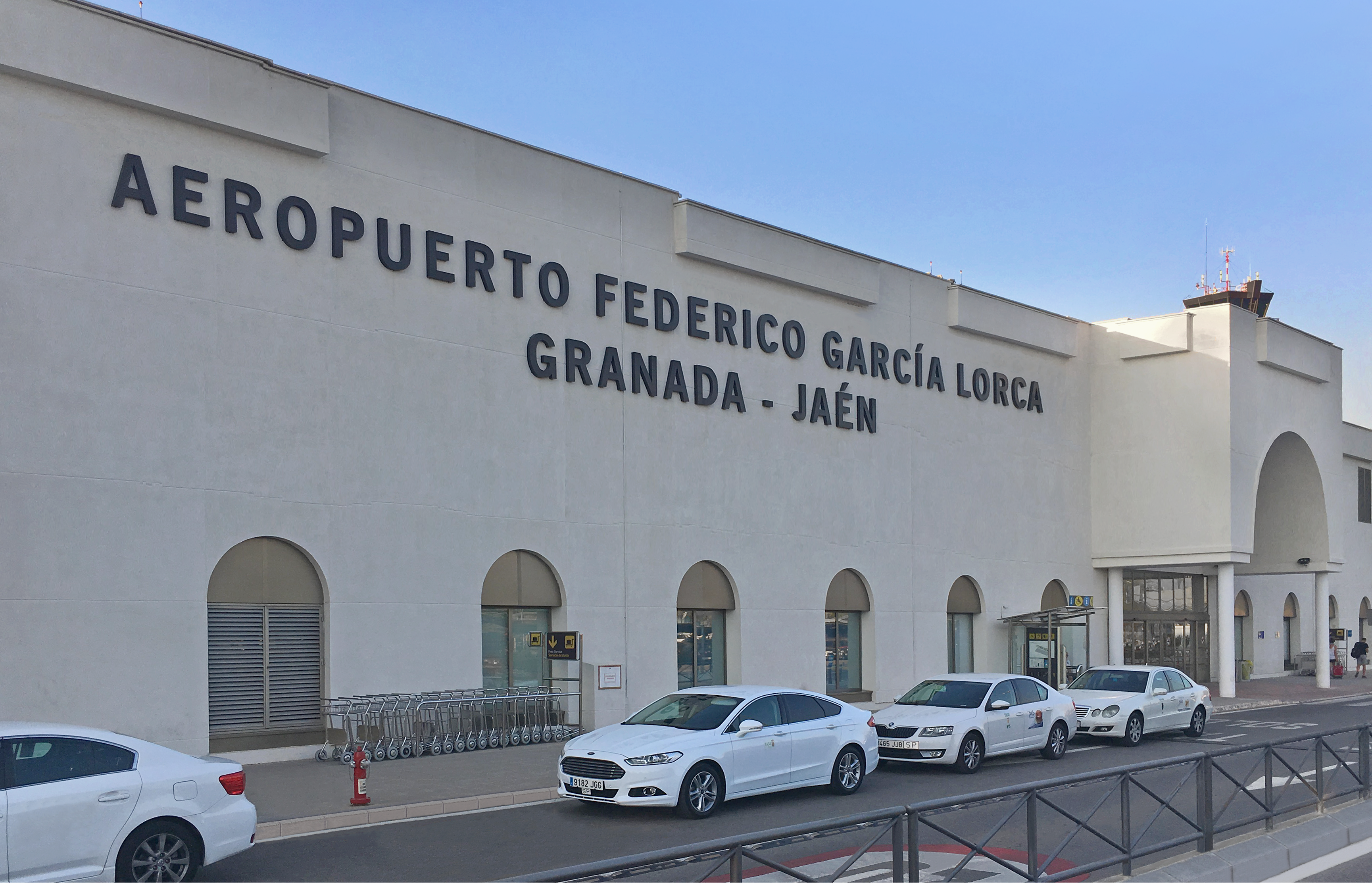 Fachada del Aeropuerto Federico García Lorca, situado en la Provincia de Granada (España)